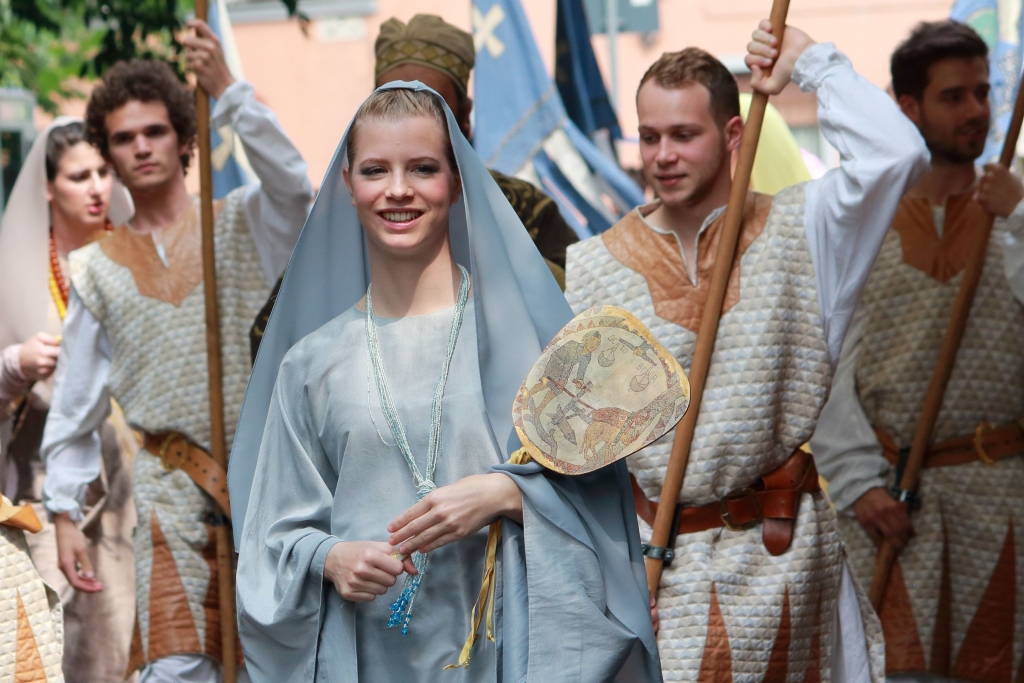 Sfilata storica per il Palio di Legnano 2015